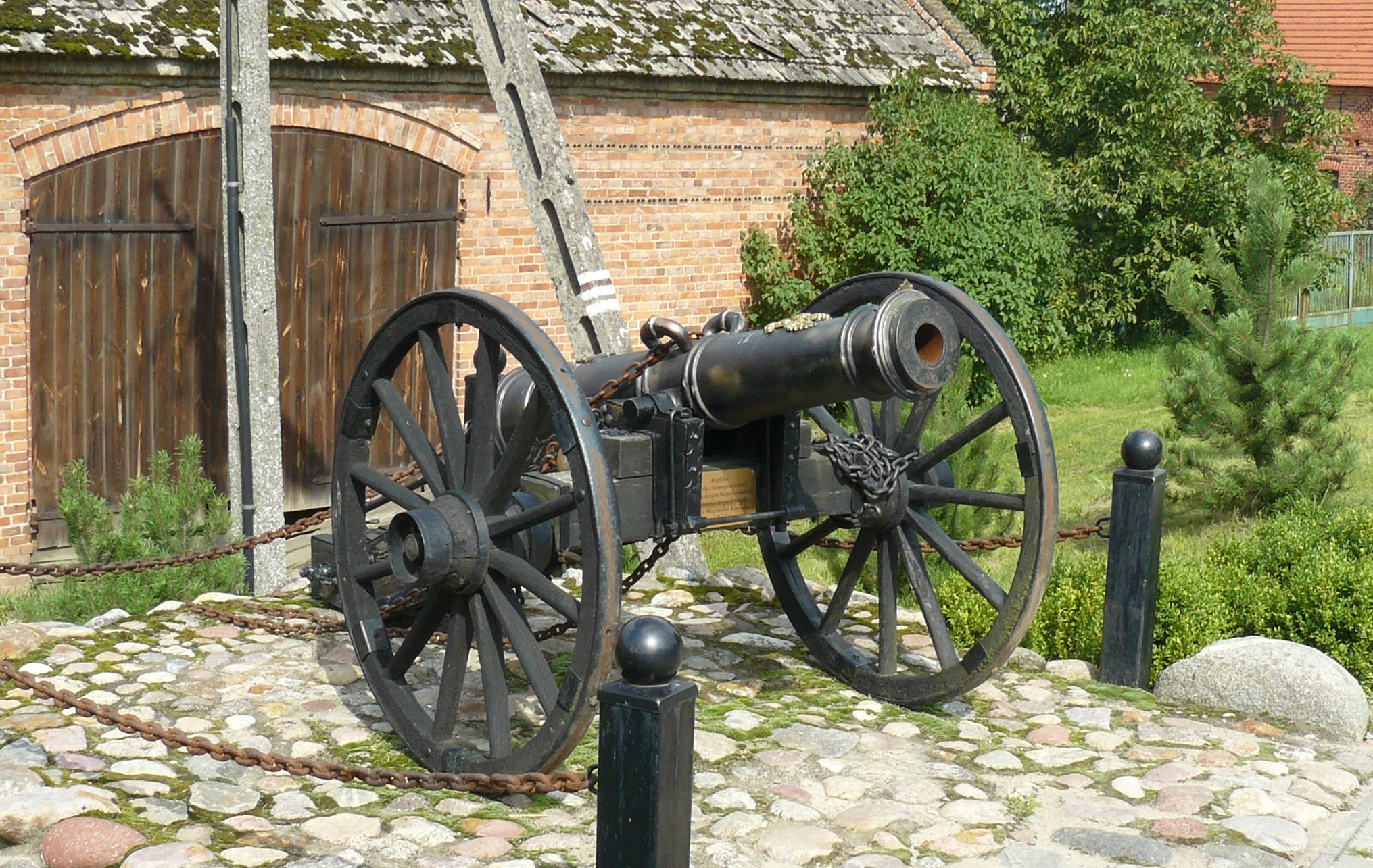 Prusim, replika armaty czarnoprochowej.